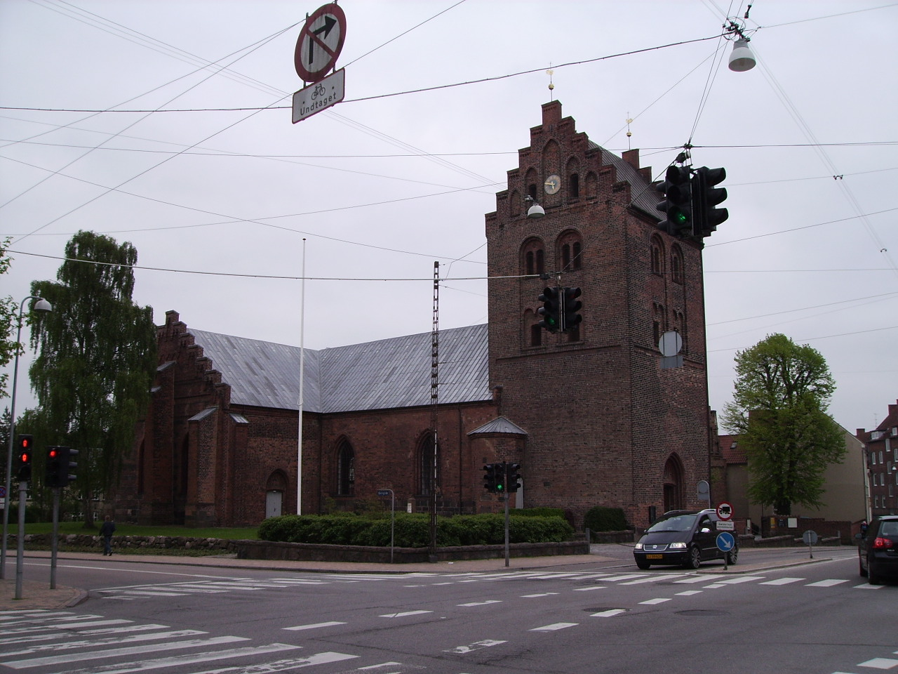 Vor Frue Kirke, Vor Frue Sogn, Odense Herred, Odense Amt, Denmark (Danish Church) Date: 17.05.2006 Photographed by Søren Møller